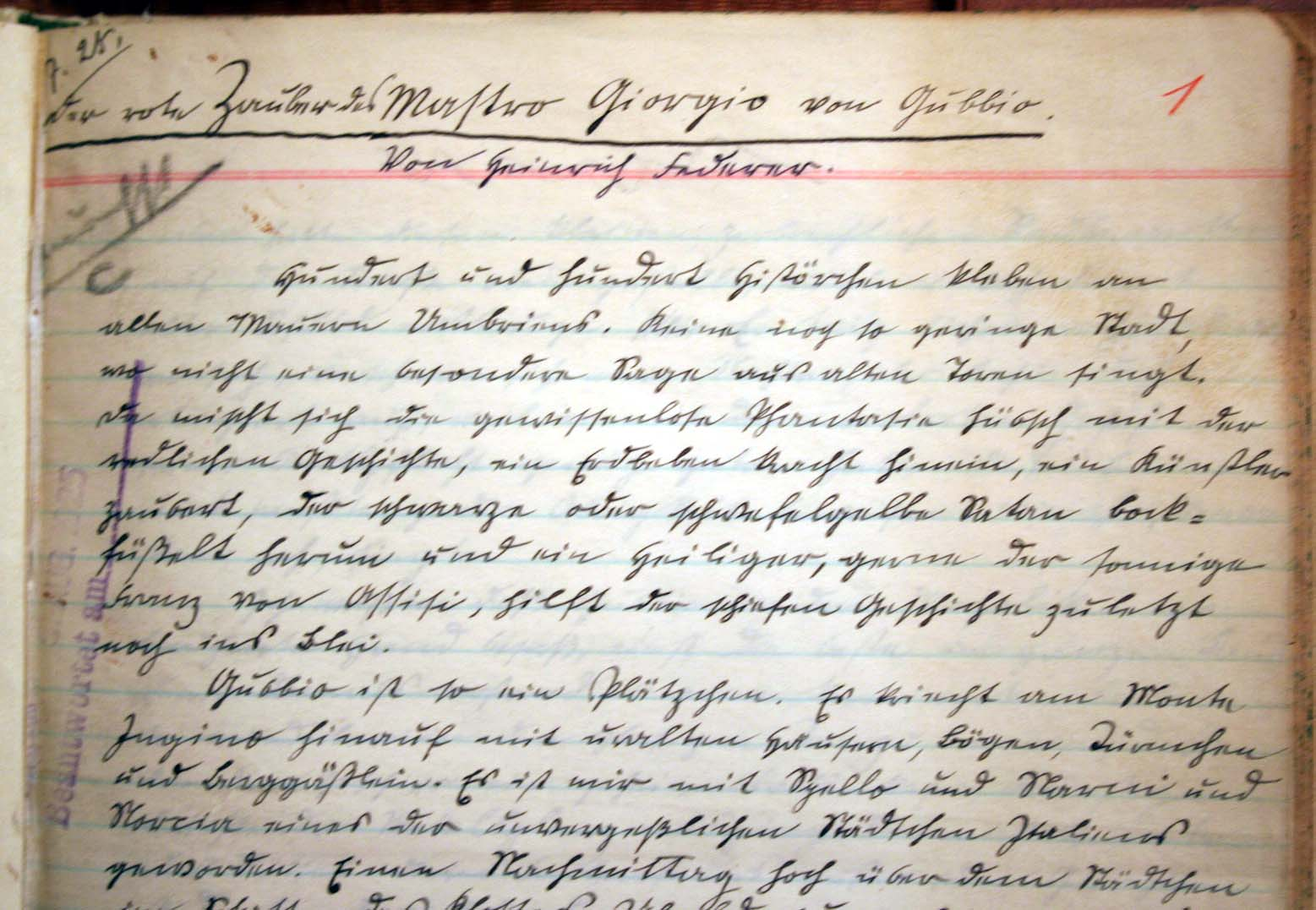 Manuskript von Heinrich Federer